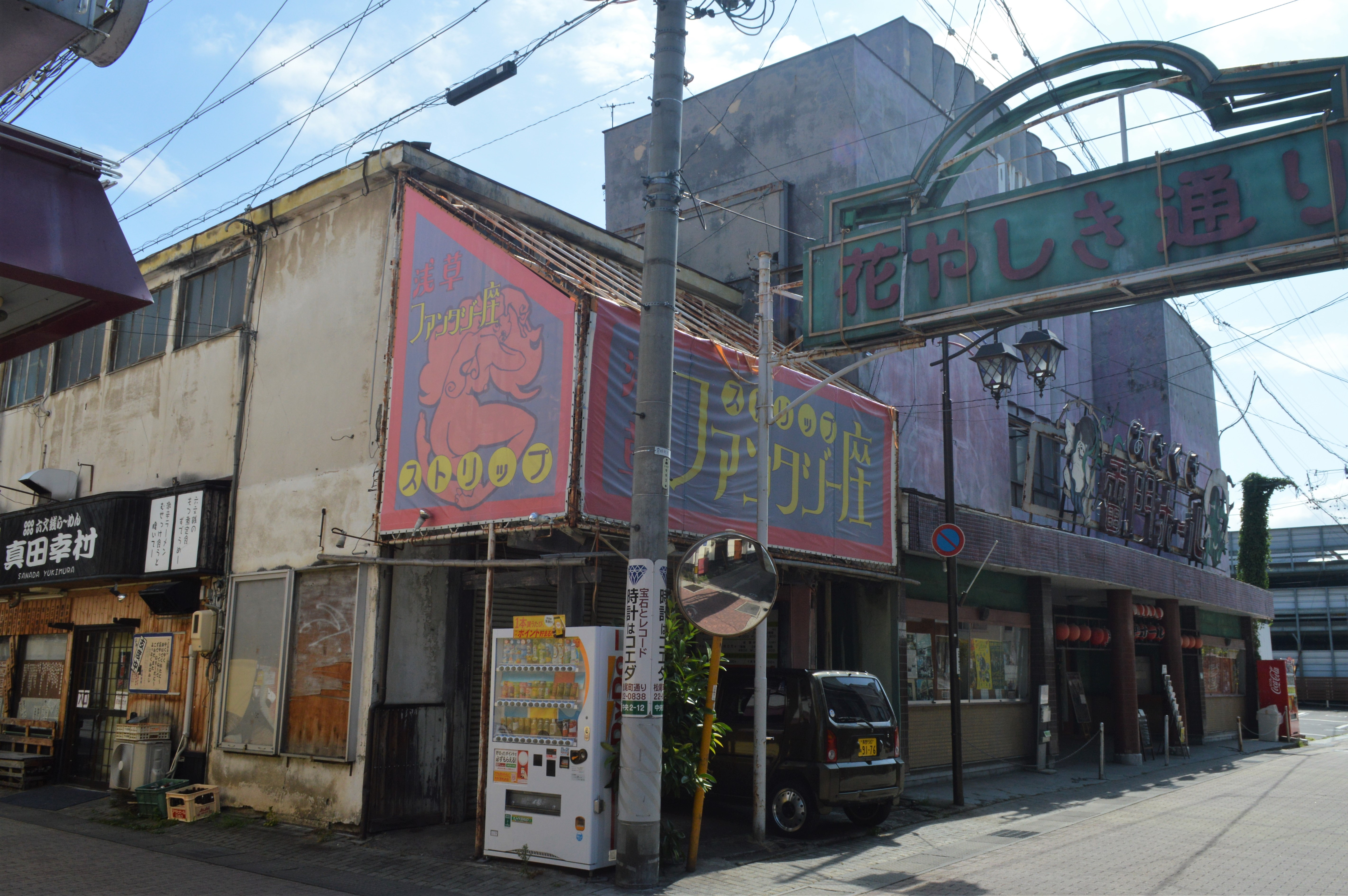 長野県上田市の映画館である上田映劇（奥）とストリップ劇場のロケセット（手前）。